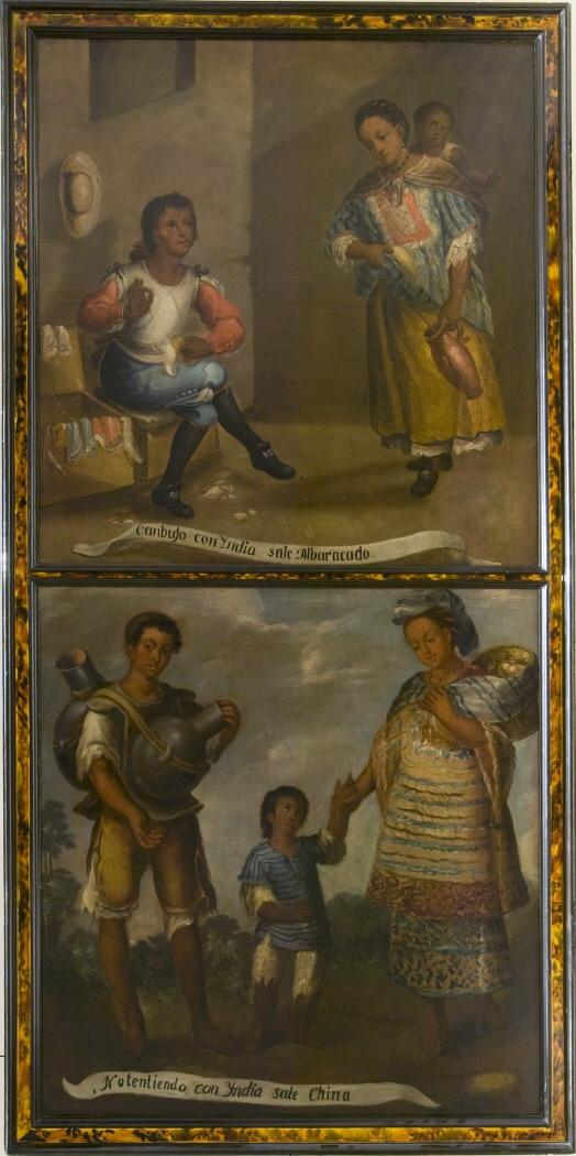 Castas: Canbujo con Yndia sale Albaracado / Notentiendo con Yndia sale China, óleo sobre lienzo, 222 x 109 cm, Madrid, Museo de América. Debería leerse "Albaraçado", correspondiente a "albarazado" en la ortografía actual.